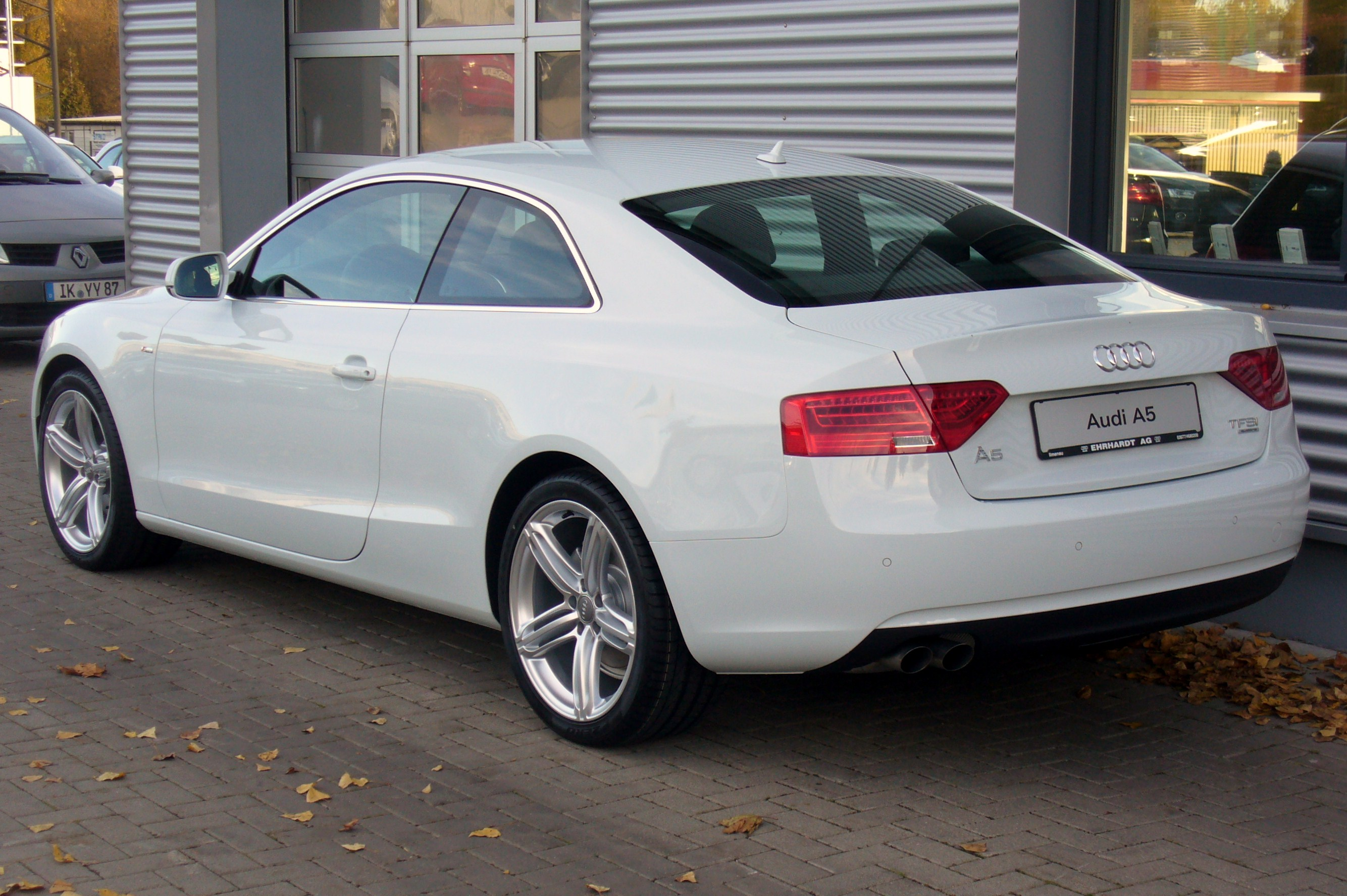 Audi A5 Coupé Facelift